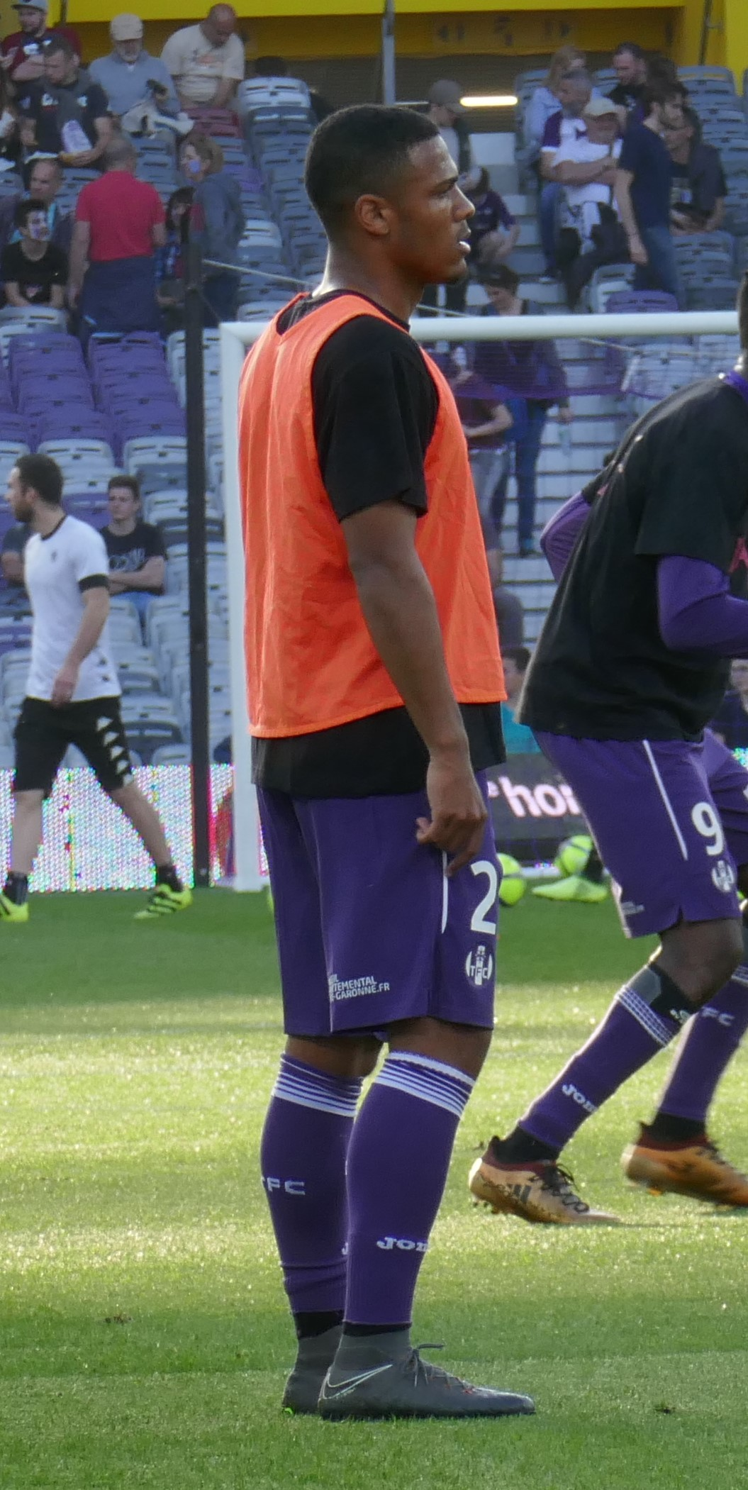 Kelvin Amian Adou lors de l'échauffement du match Toulouse FC - Angers SCO comptant pour la 34ème journée de Ligue 1 2017-2018, le 21 avril 2018.